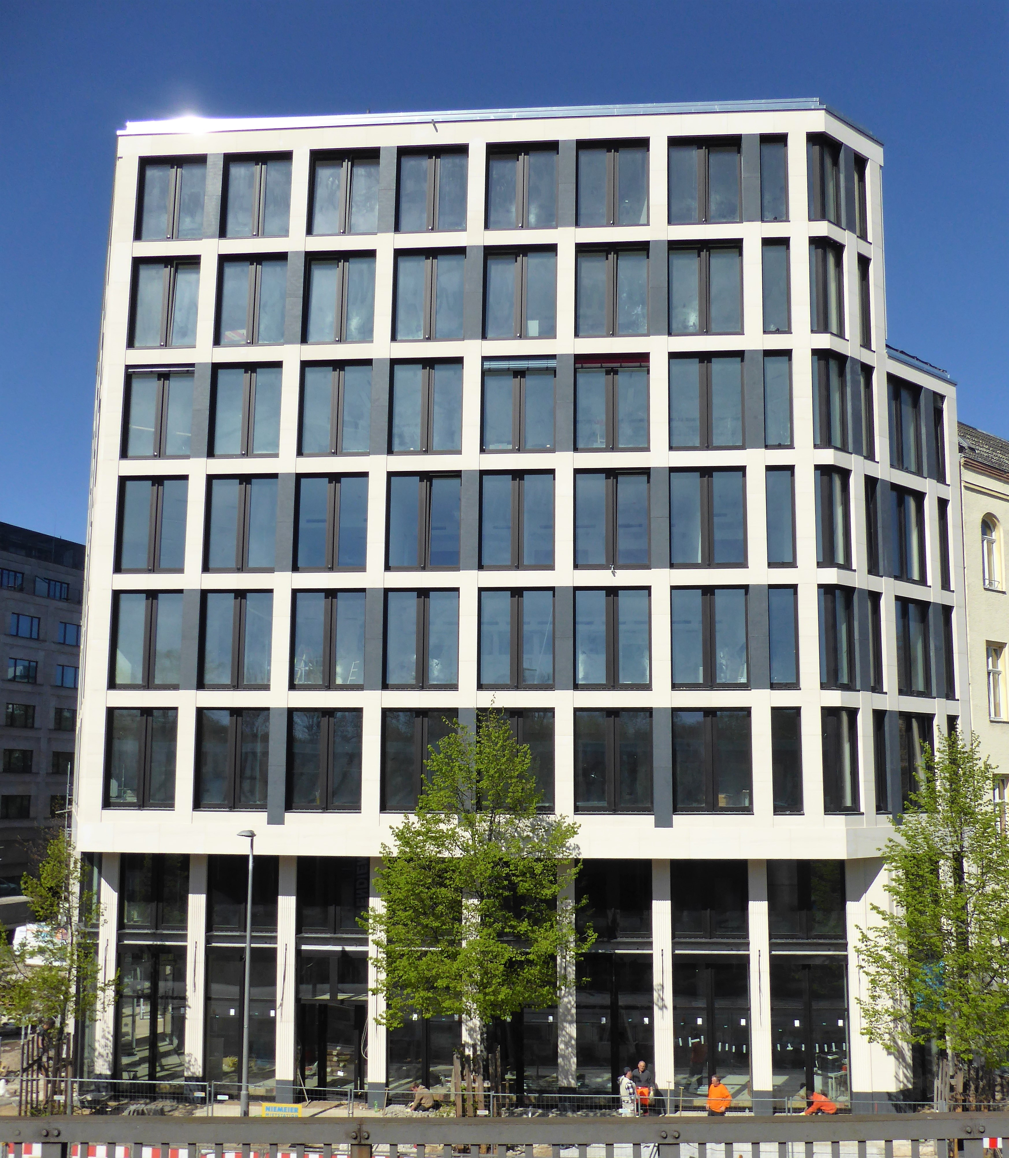 Hansaviertel Bachstraße HGHI-Tower